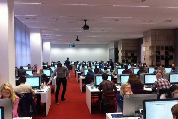 Computergestützte summative Semesterabschlussprüfung an der Freien Universität im Jahre 2013